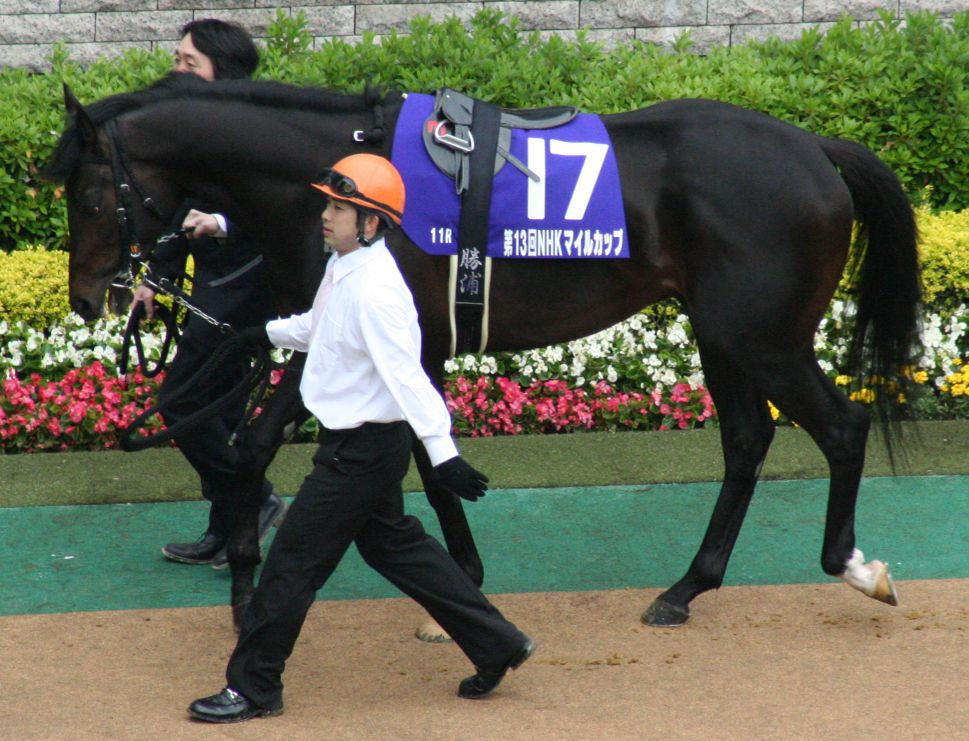 アポロドルチェ（東京競馬場）